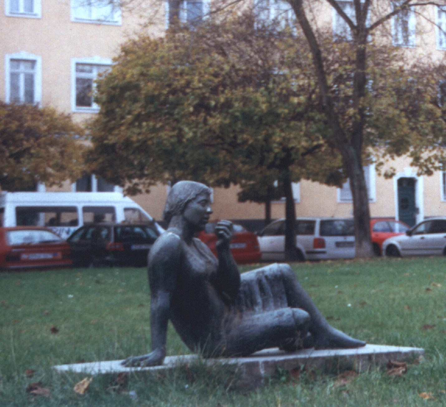 Skulptur von 1974, 2005 umgesetzt auf eine Wiese Rüdigerstraße Ecke Hagenstraße, Zweitguss; im Jahr 2018 nicht mehr im öffentlichen RaumKünstlerin: Christa Sammler